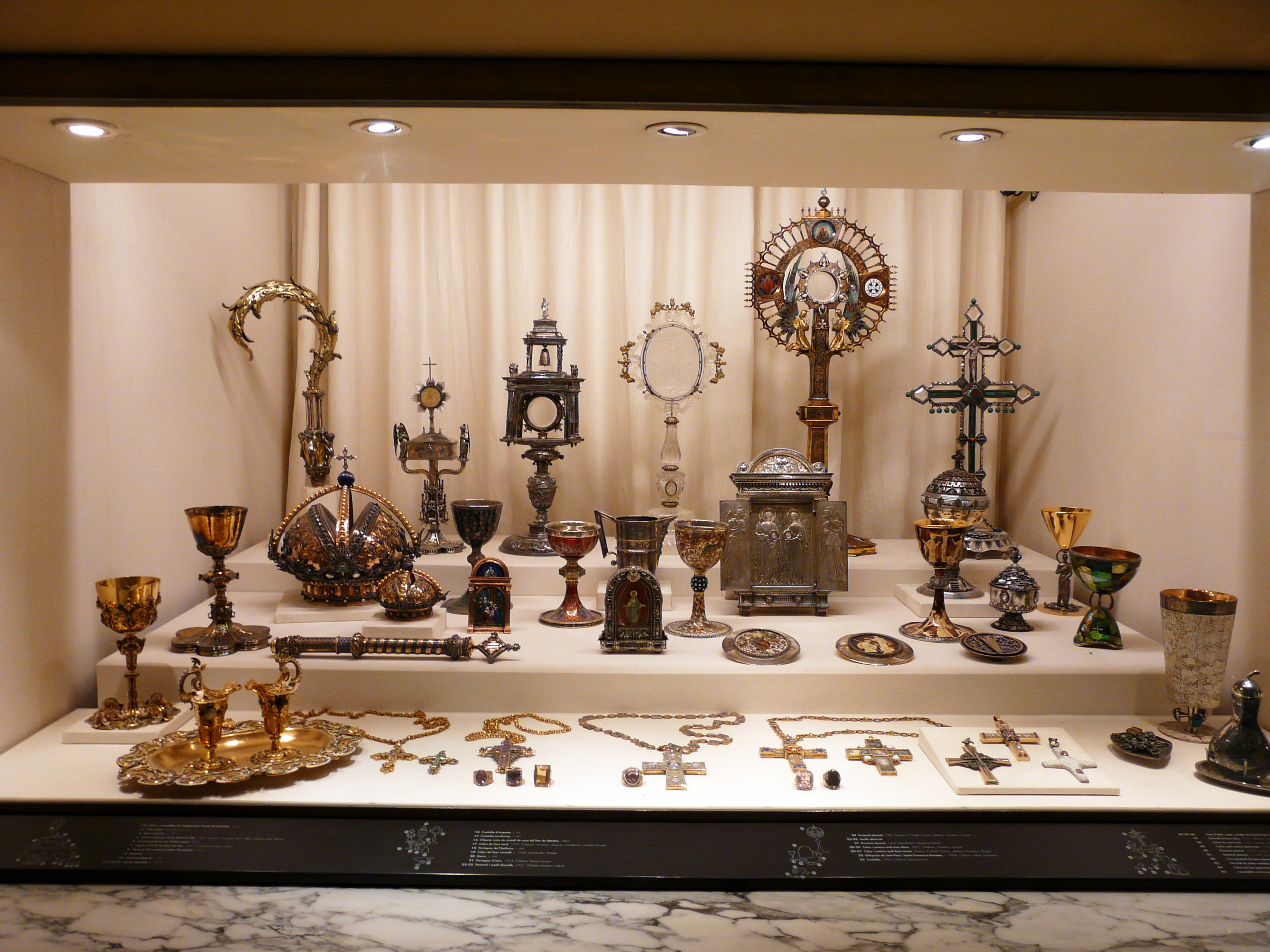 Драгоценности